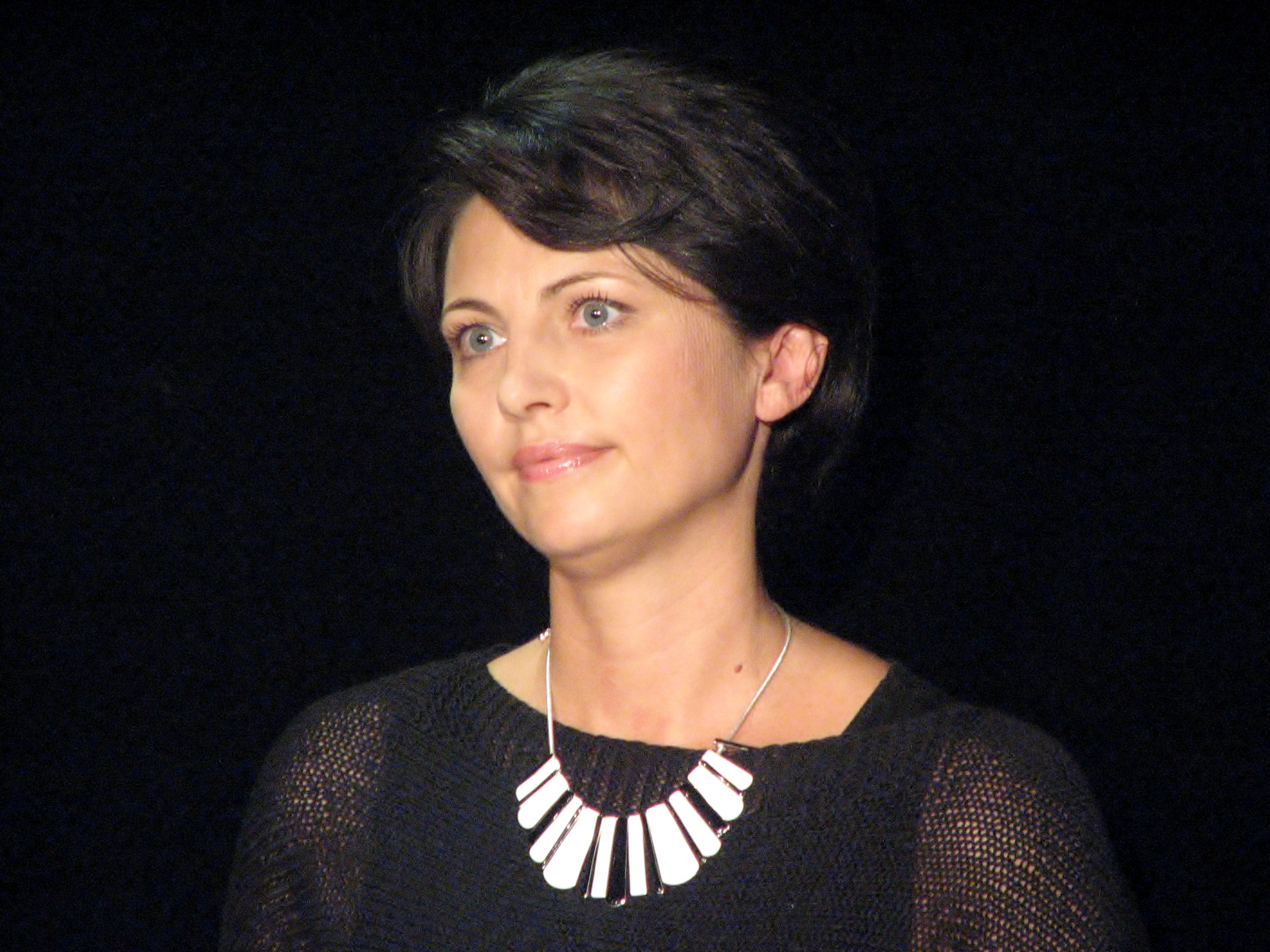 Jelena Poverina-Tšernõh Eesti Rahvusraamatukogu teatrisaali laval festivali III Dovlatovi Päevad Tallinnas raames